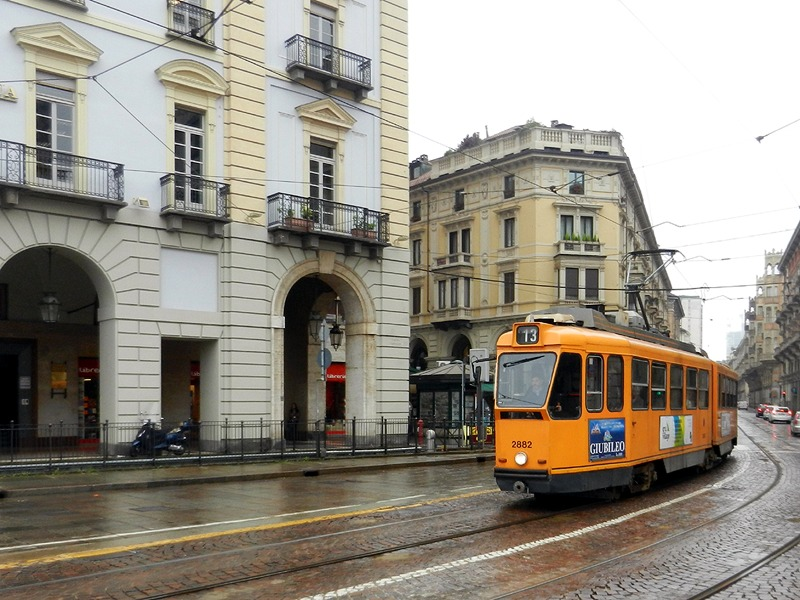 Torino - Tram in Piazza Castello